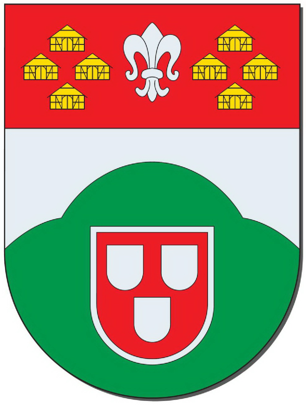 Wappen der Gemeinde Worpswede